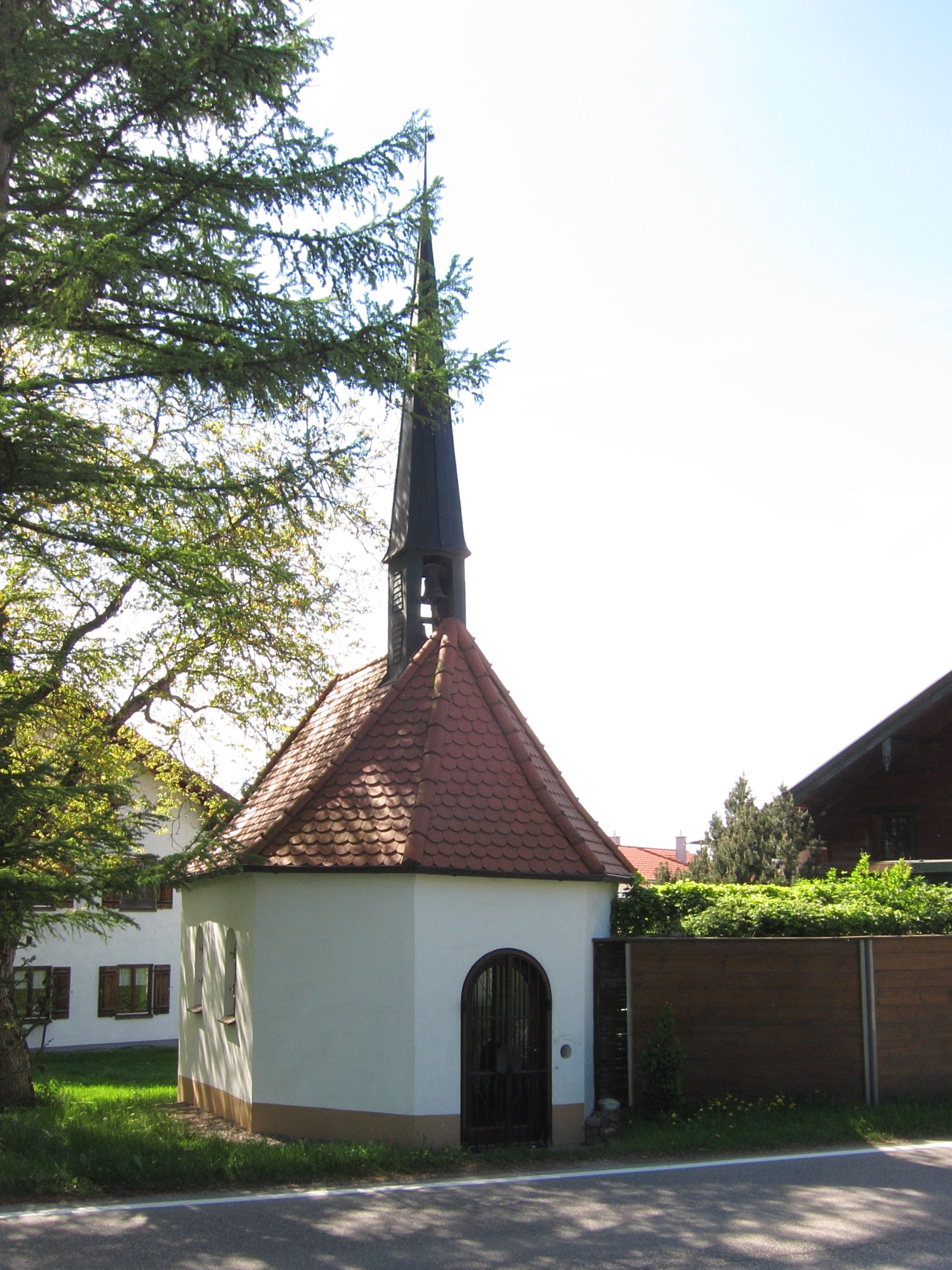 Eisendorf; Kapelle, im Kern 15. Jahrhundert, Dachreiter modern; mit Ausstattung.